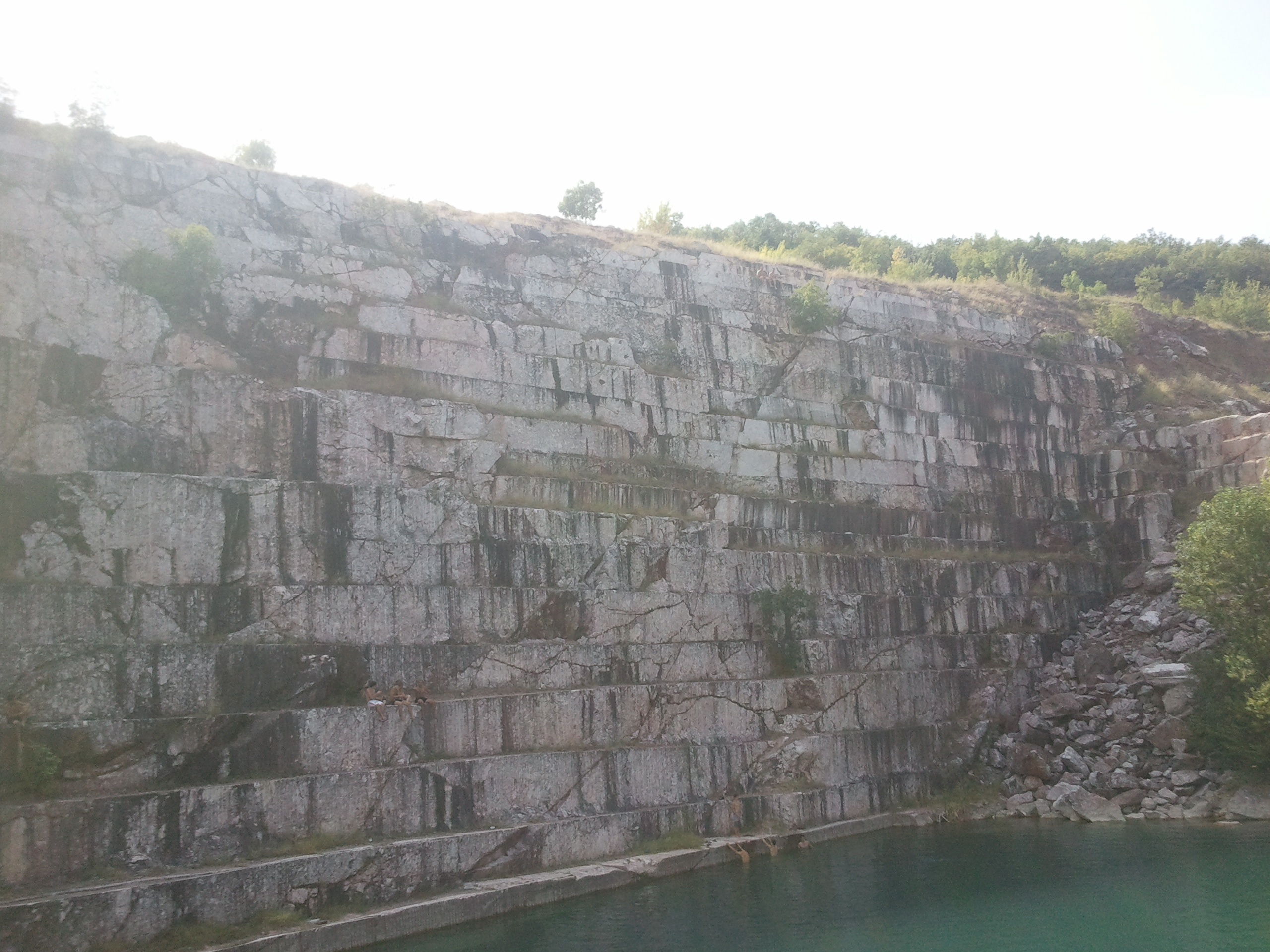 Изглед към една от стените на Мраморното езеро, разположено близо до село Православ,община Братя Даскалови, Област Стара Загора.